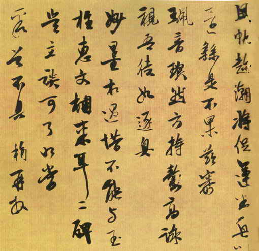 [元] 袁桷 书法 《雅潭帖》，原作为二维平面艺术（古代书法作品），作者逝世已逾百年，无特殊版权要求。